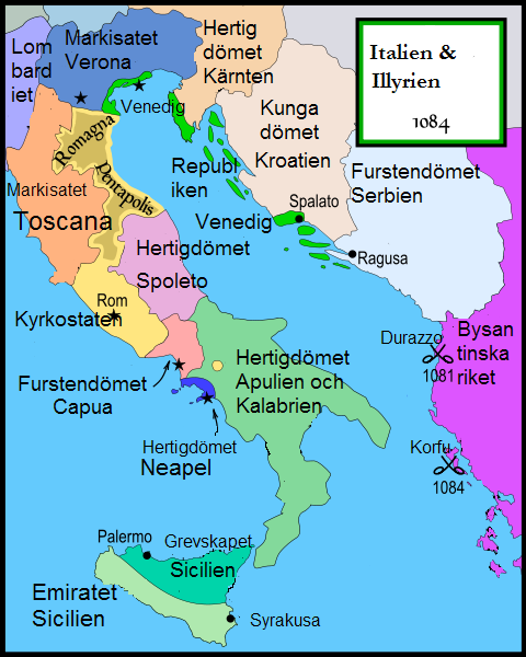 Karta över Italien och Illyriens custer år 1084.